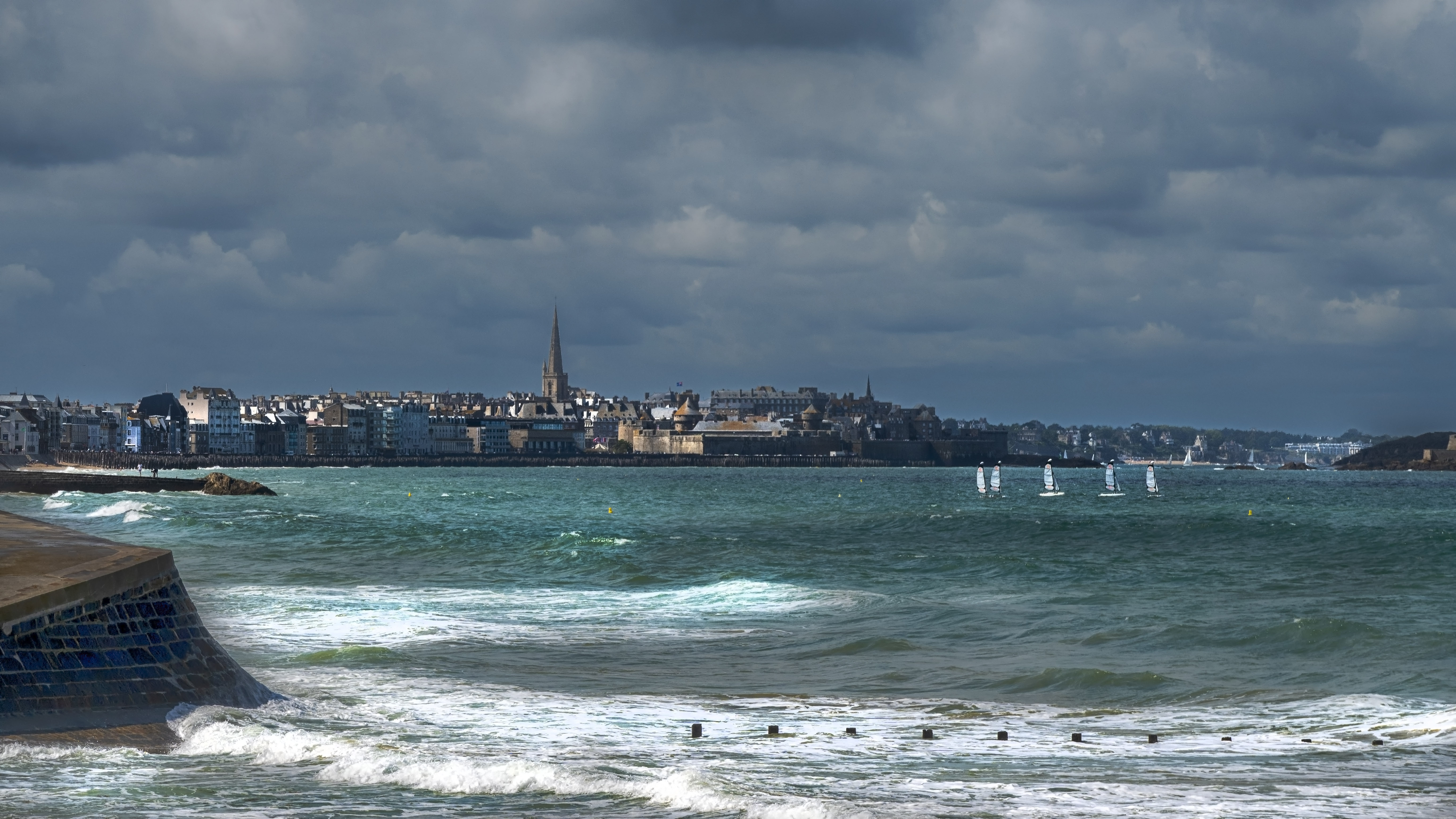 Vista de Saint Malo da praia de Du Pont, ao norte da cidade.